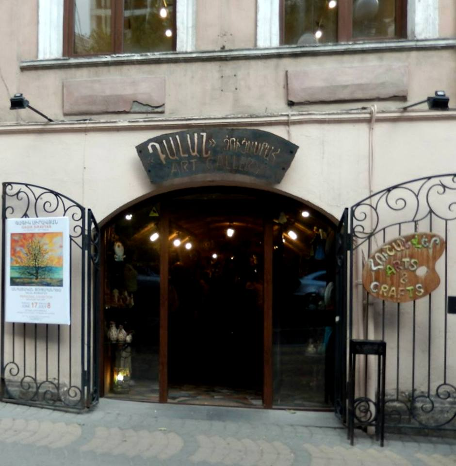 Դալան պատկերասրահ